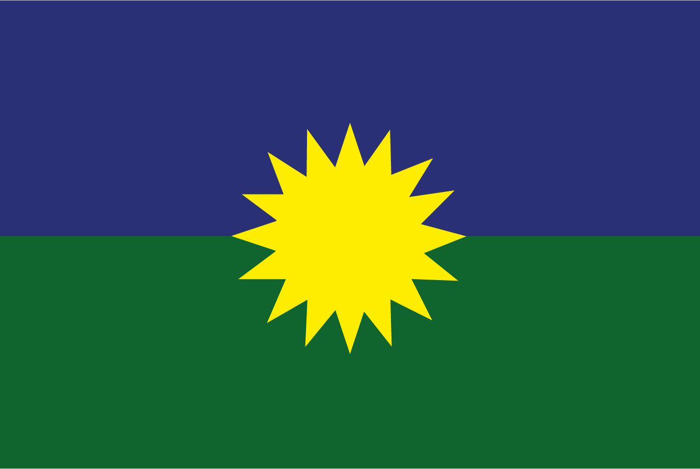 O símbolo do urbanismo, criado por Carlos Maria della Paolera, representa três elementos considerados essenciais à vida humana: o sol (em amarelo), a vegetação (em verde) e o ar (em azul).